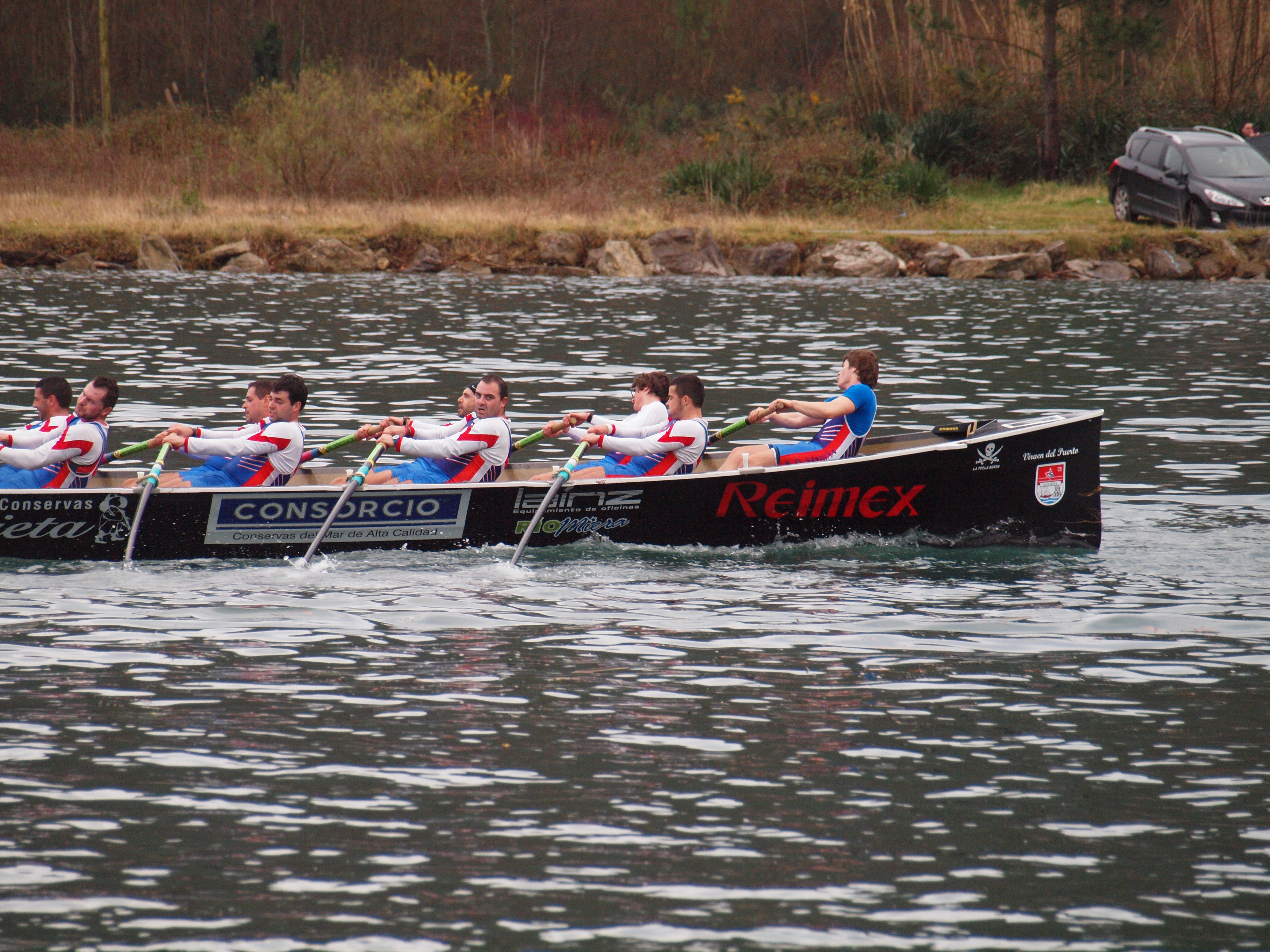 Trainera de Santoña (Cantabria, España) en Descenso de traineras Orio